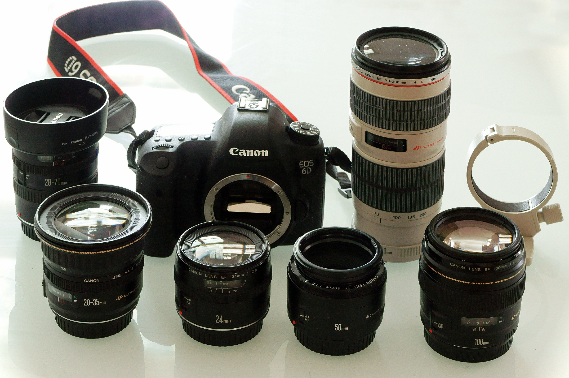 EOS EOS 6D EF 2,8/24mm EF 1,8/50mm EF 2,0/100mm EF 70-200mm F4L USM EF 3,5-4,5/20-35mm